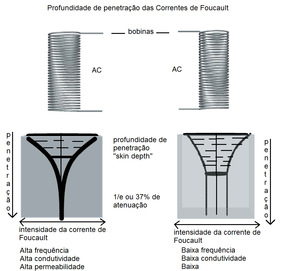 mostra a dimuição exponencial da intensidade da corrente de Foucault.